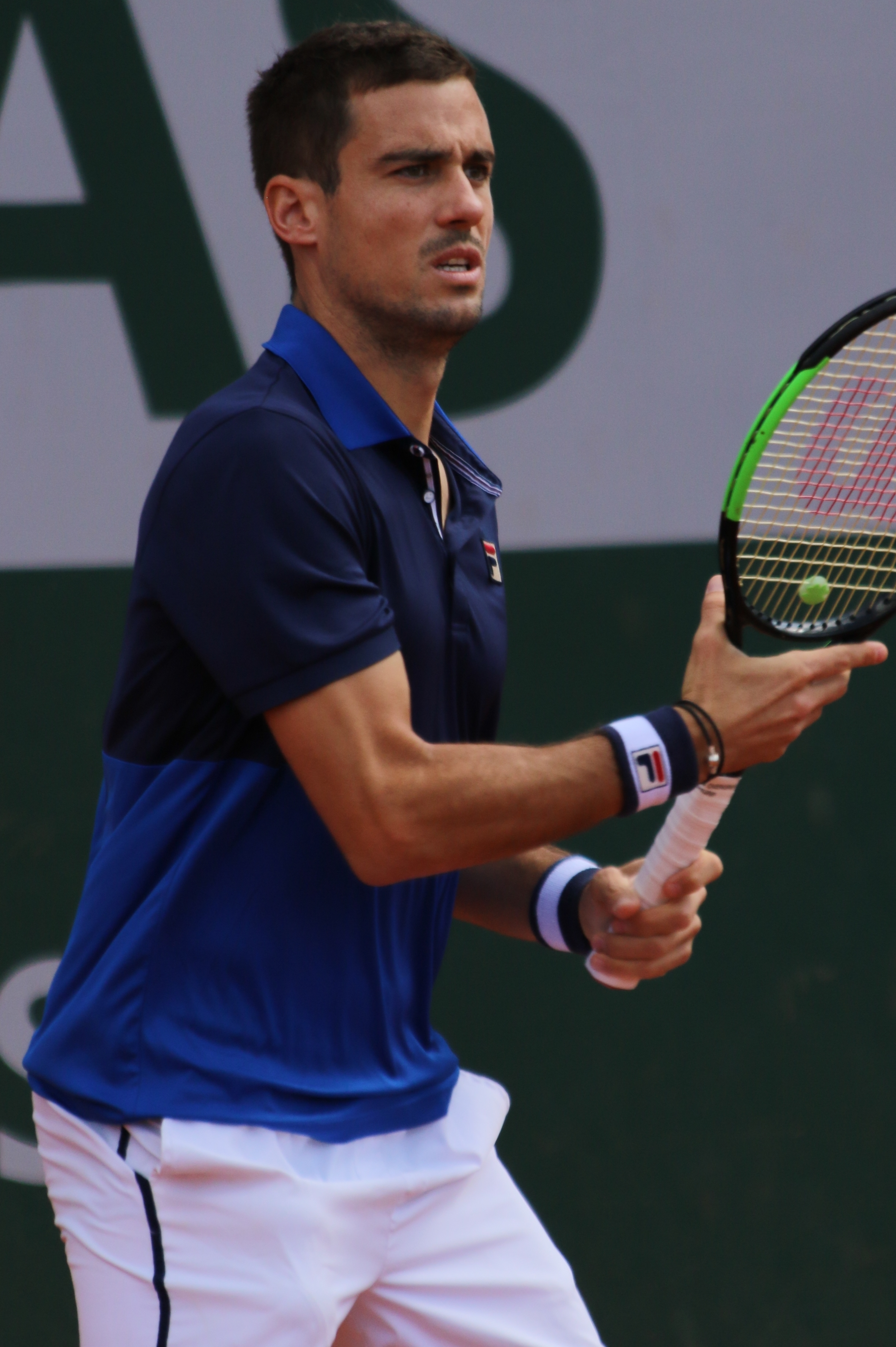 Pella RG19 (2)